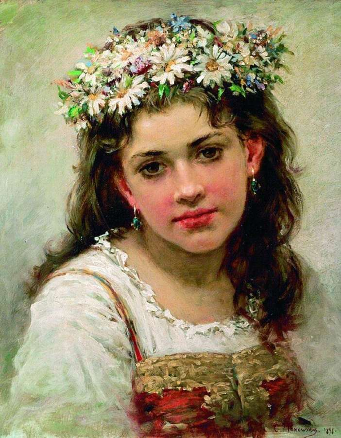 Головка девочки 1889